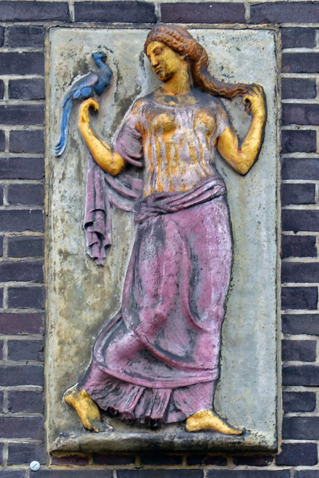 Ehemalige Staatsanwaltschaft Essen in Essen-Rüttenscheid, Relief